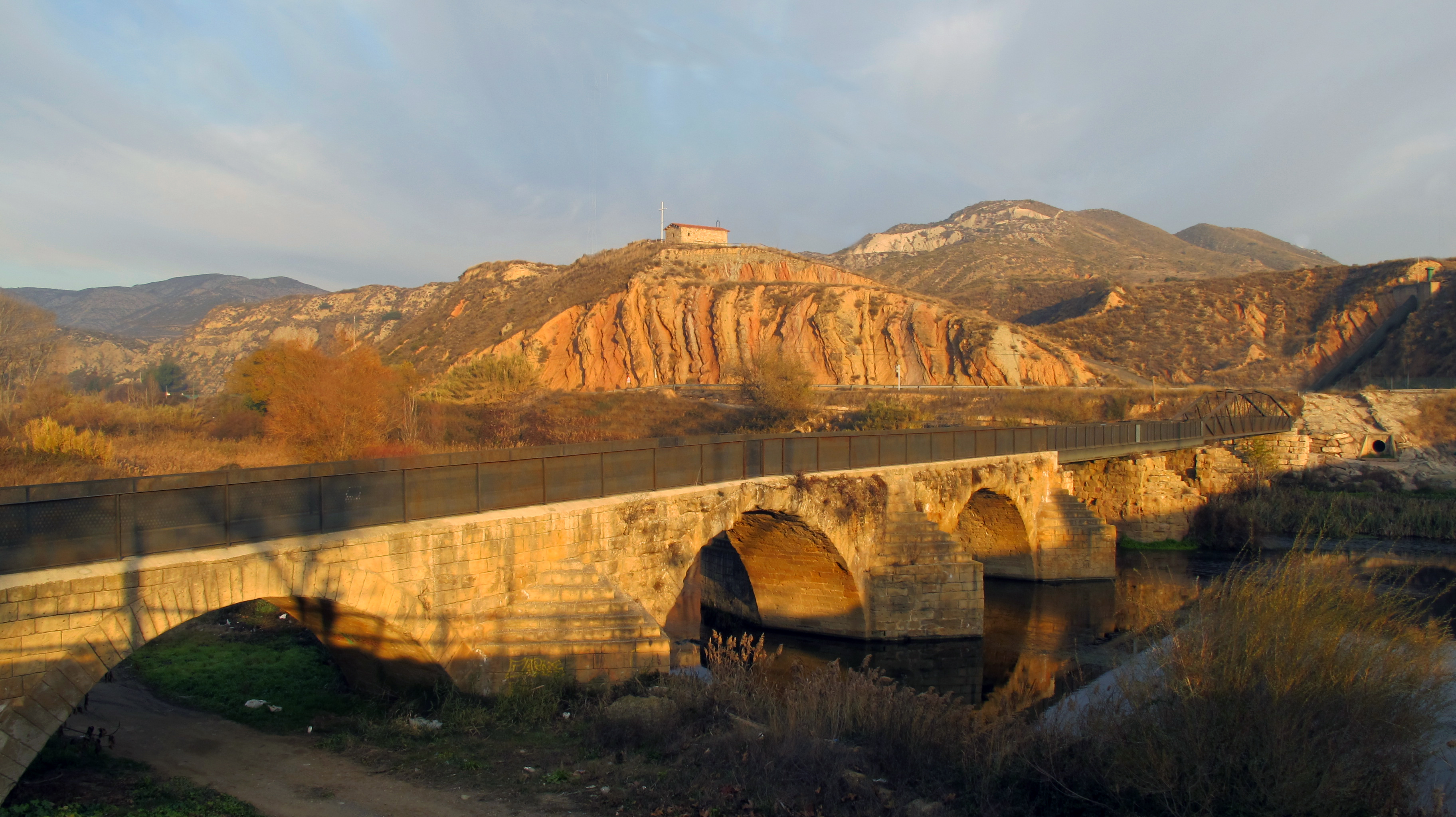 El pont vell d'Alfarràs sobre la Noguera Ribagorçana